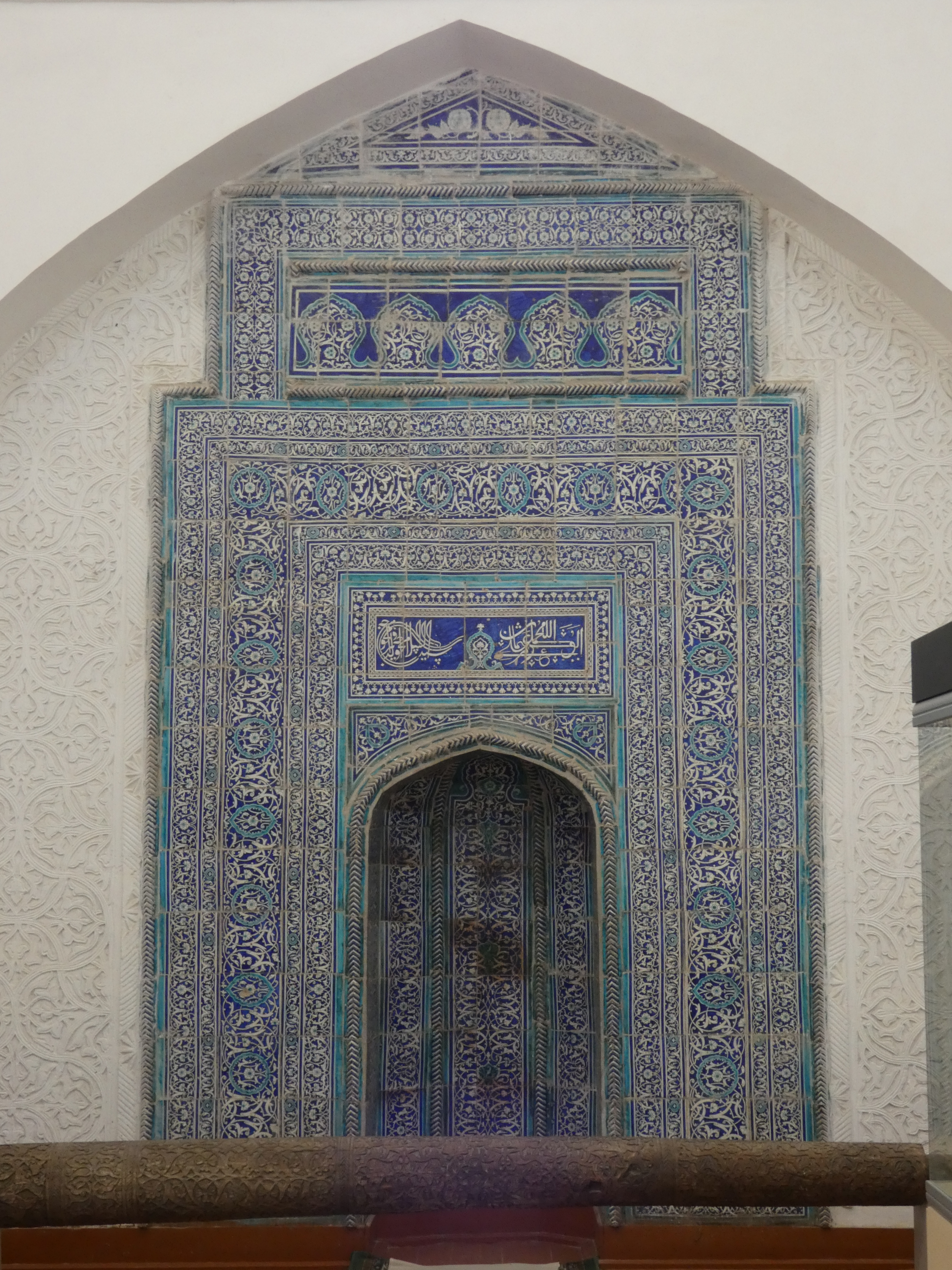 Mihrabnische der Medrese Islam Khodja, Chiwa